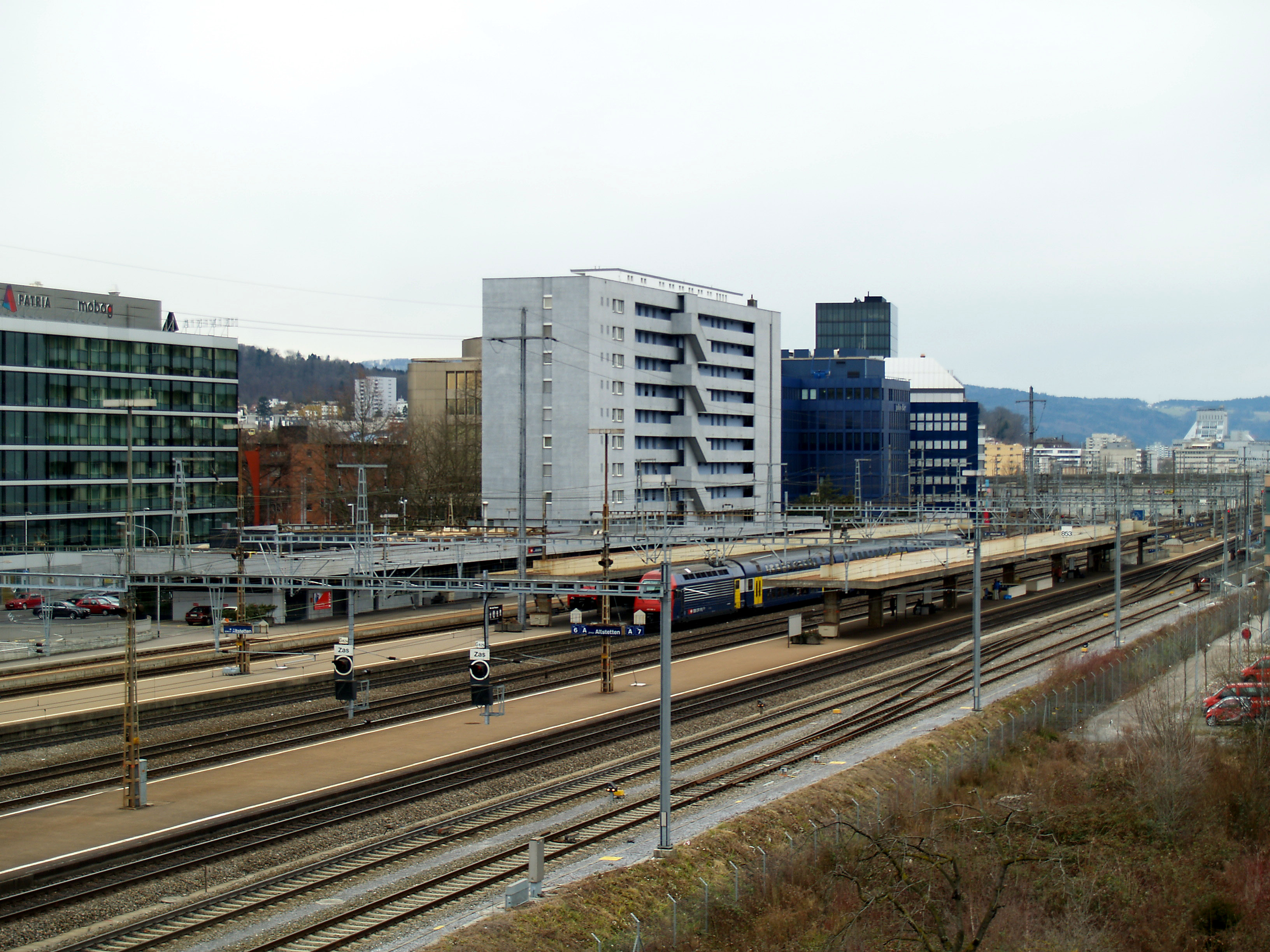 Der Bahnhof Zürich Altstetten von der Europabrücke aus gesehen. Aufgenommen am 19.02.2006.